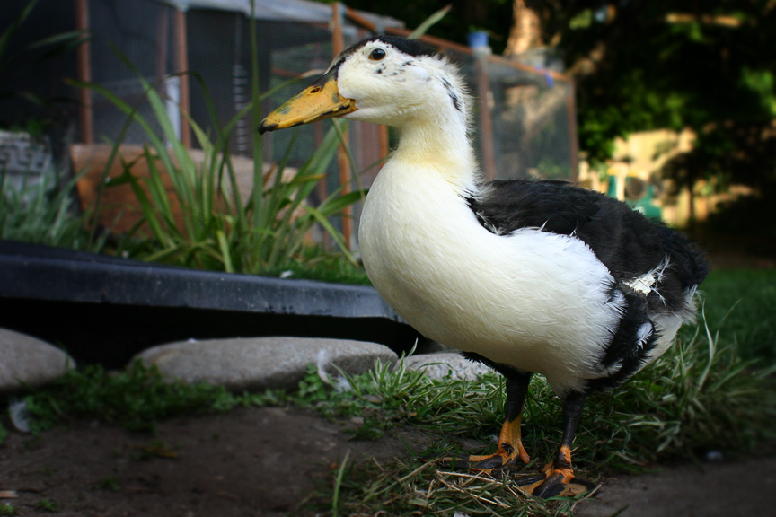 Magpie Duck